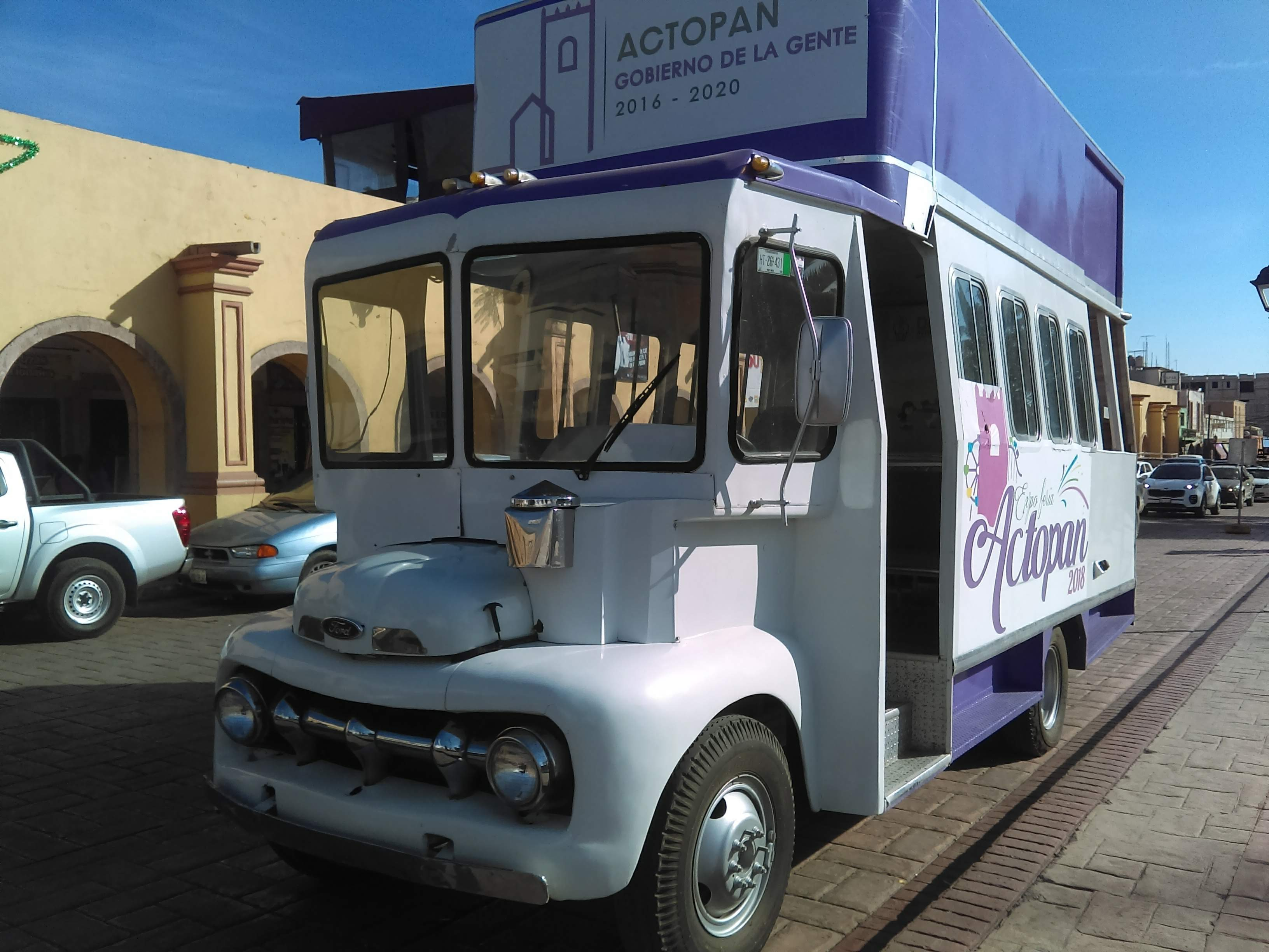 Turibus en Actopan, Hidalgo, México.